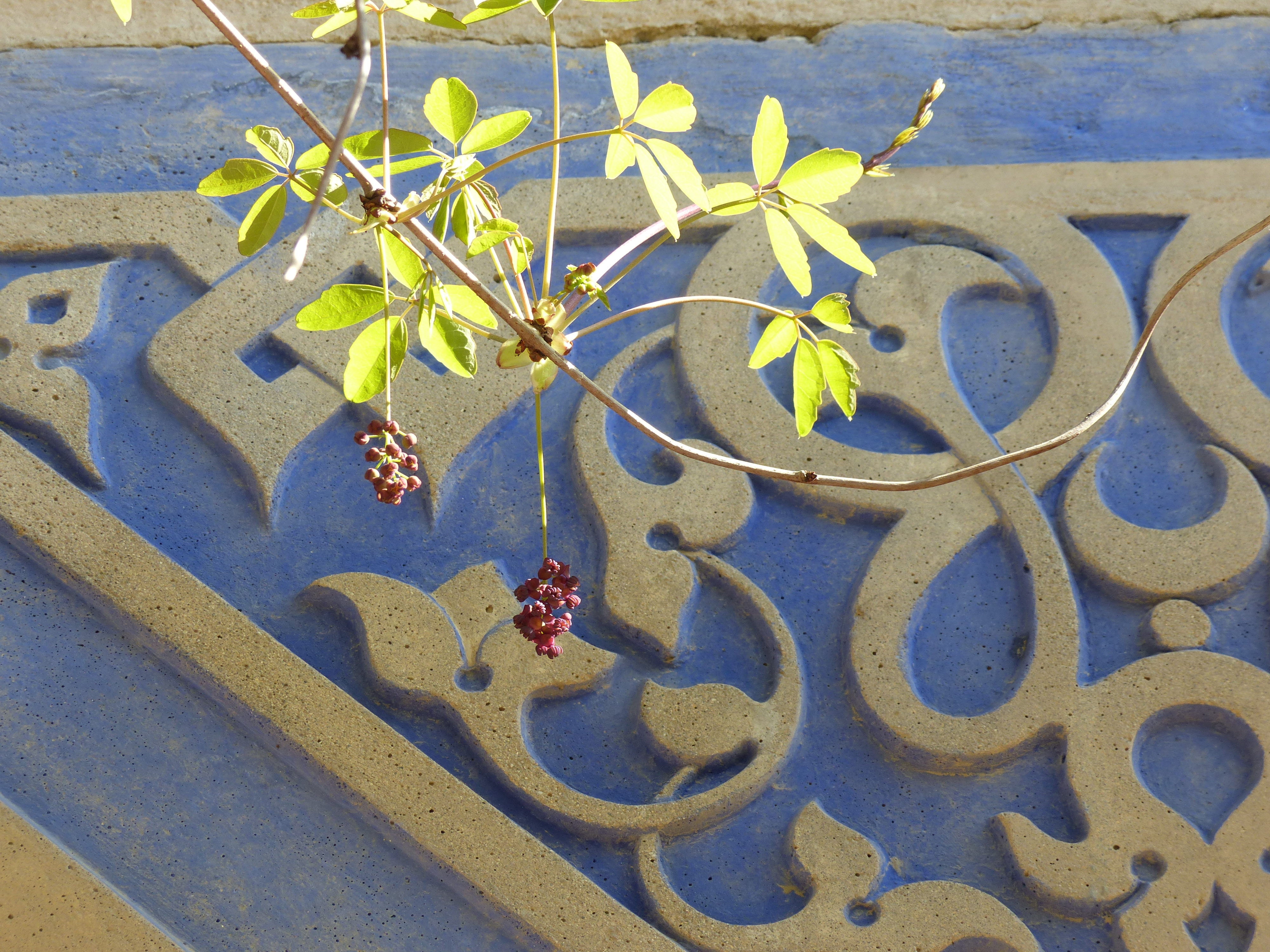 La Casamaures, Saint-Martin-le-Vinoux, Isère, France. Cette photo fait partie d'une série de 30 photos. Don à Wikimédia par Sylvie Jeanson, à l'occasion des 30 ans de l'association "La Casamaures d'hier et d'aujourd'hui", dans le cadre des Journées contributives à la Casamaures du 4 et 5 avril 2015. Photo autorisée par l'association et par la proprietaire Christiane Guichard.